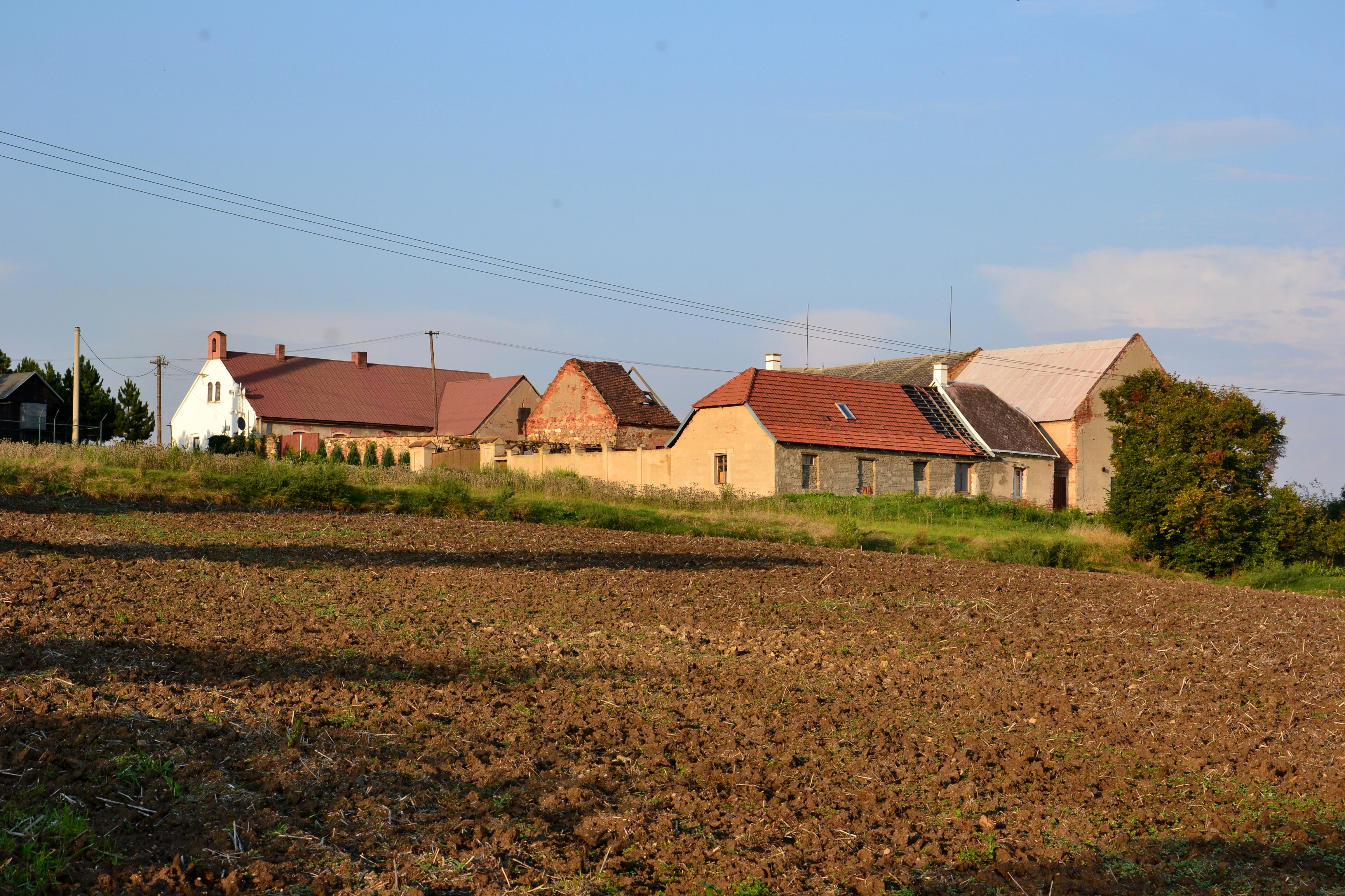 Pohled na osadu z jihu